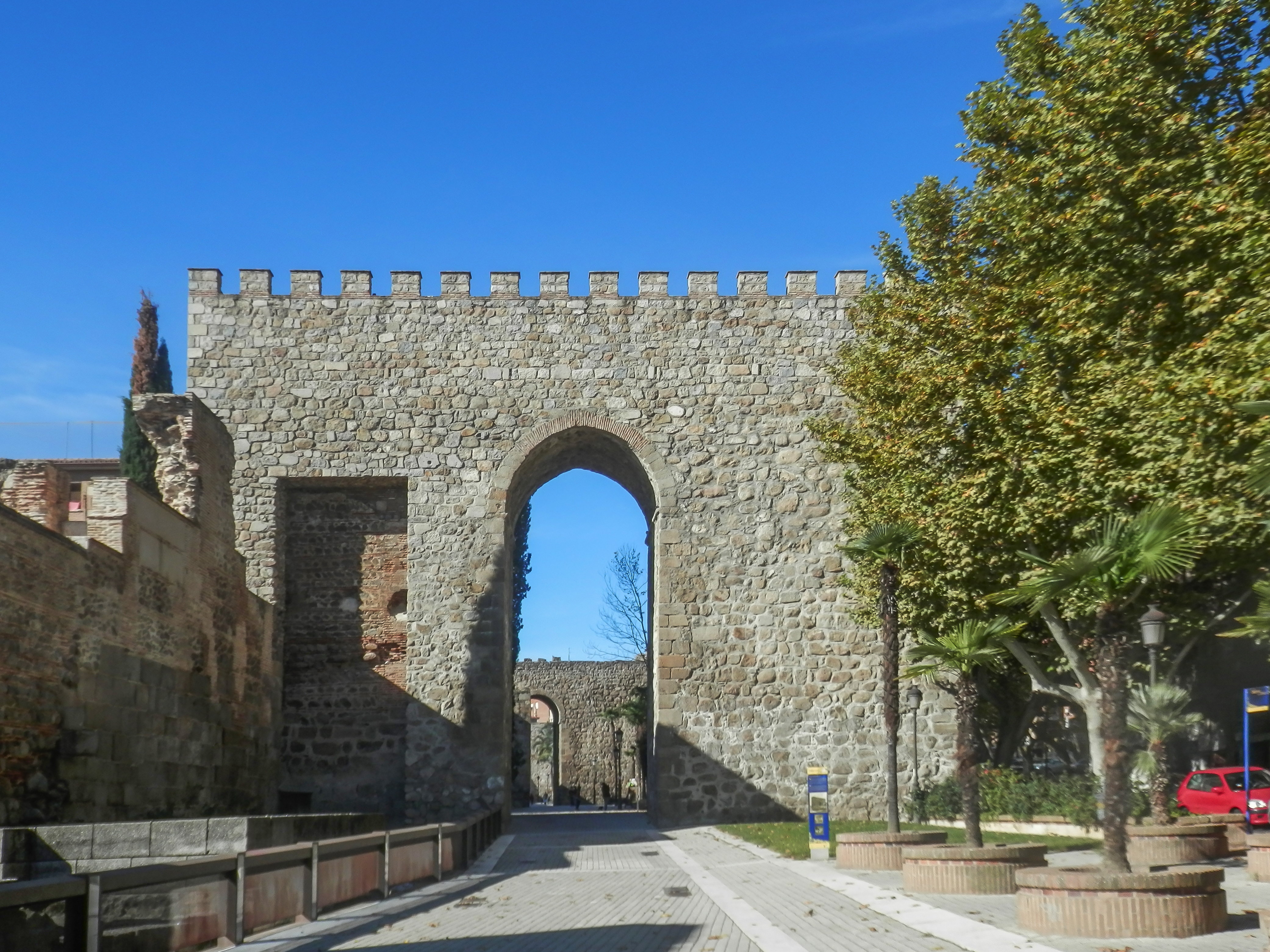 Muralla albarrana de Talavera de la Reina.